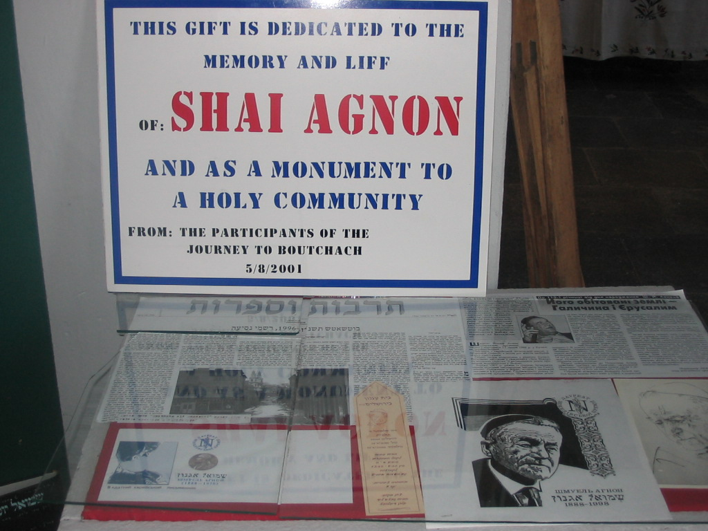 Samuel Agnon stand at Buchach Museum, Buchach, Ukraine